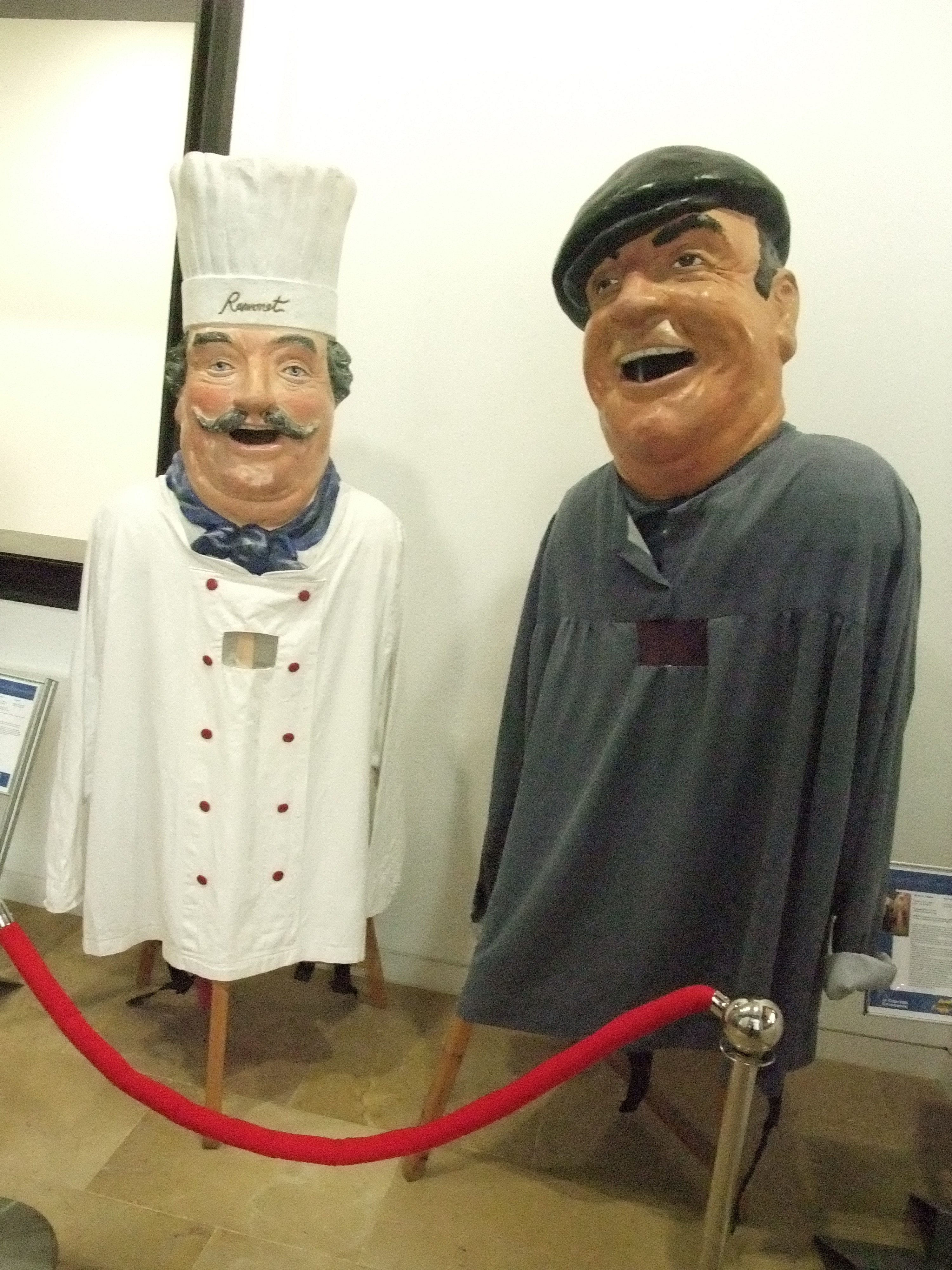 Gegantons en Ramonet, cuiner, i en Ganxut, estibador del port, dels gegants de la Barceloneta.